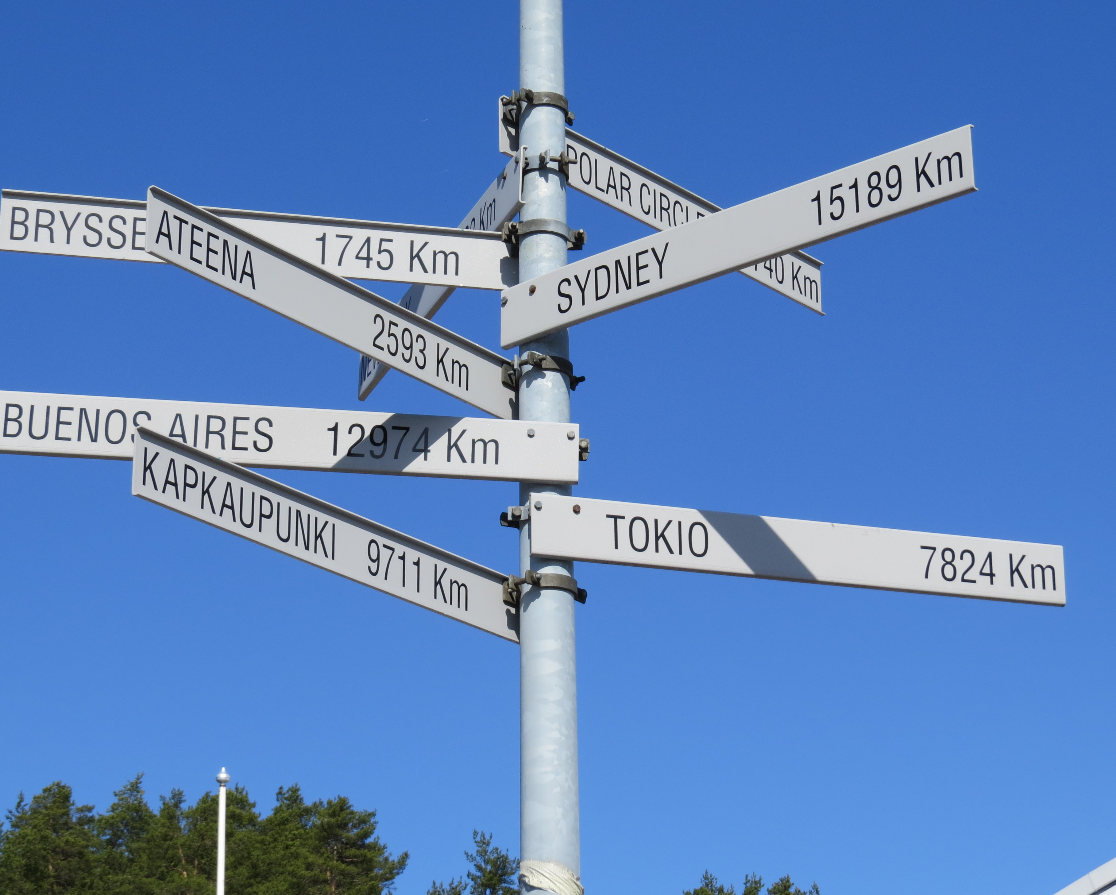 Указатель расстояний рядом со спортивной ареной